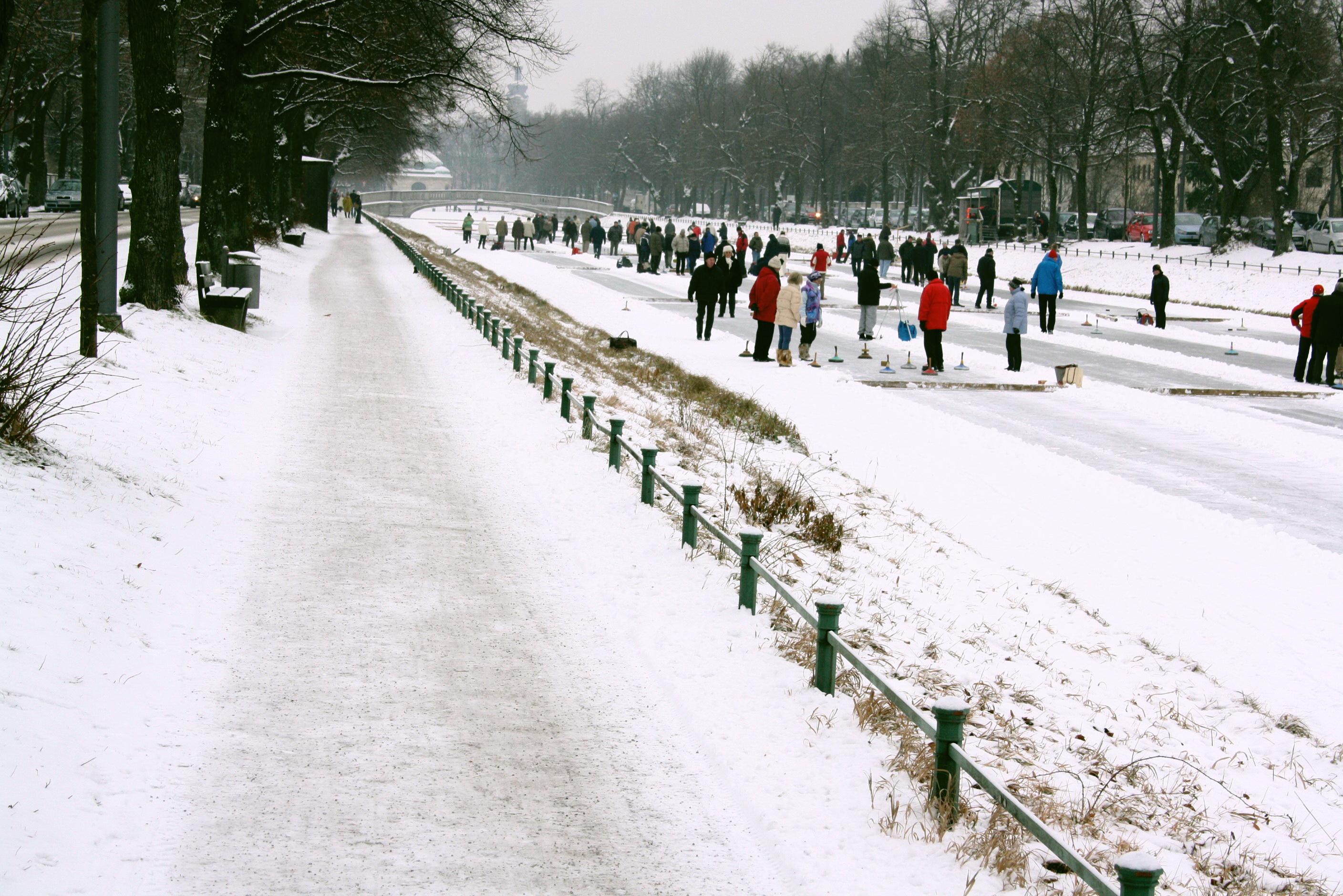 Eisstockschützen am Nymphenburger Kanal in München